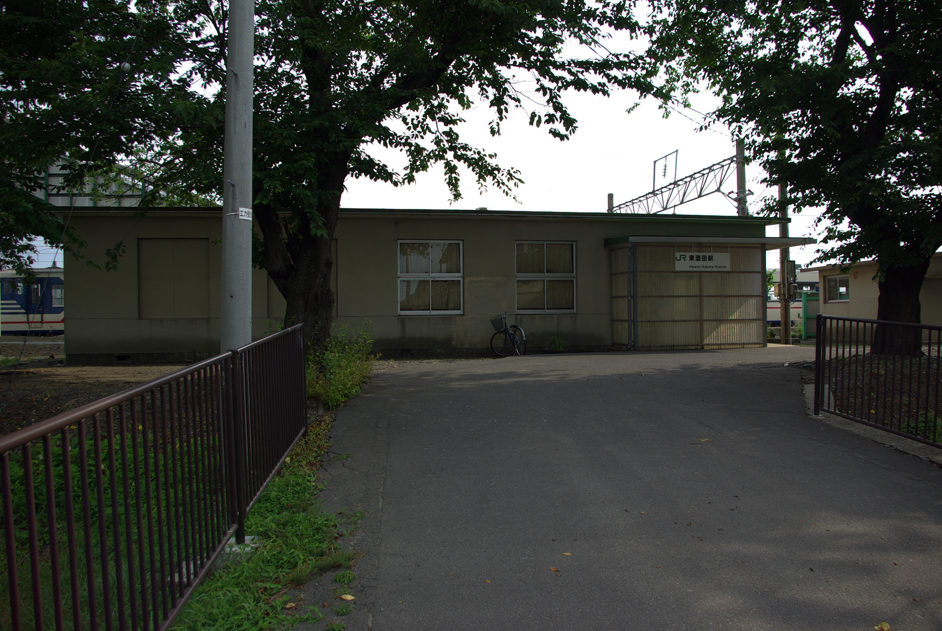 JR羽越本線東酒田駅